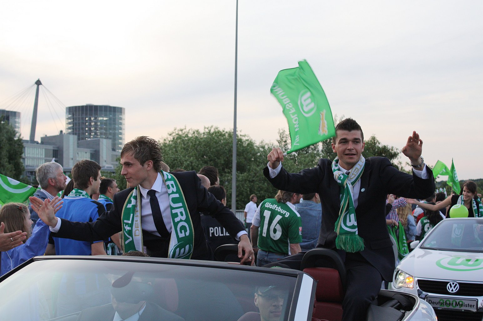 Deutscher Meister 2009 - VfL Wolfsburg 23.05.09 Feiernde Spieler im Autokorso.